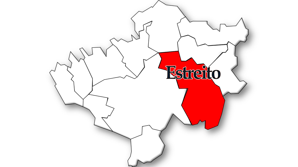 População